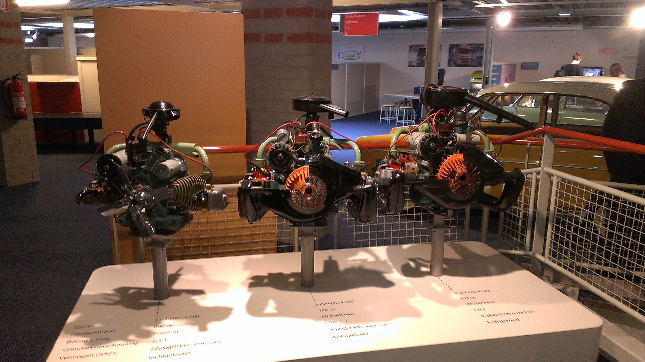 De DAF 2 cilinder motor familie met van links naar rechts: 590 cc (DAF 600), 746 cc (DAF 750 Daffodil 30, 31, 32 en DAF 33) en 844 cc (DAF 44 en 46)